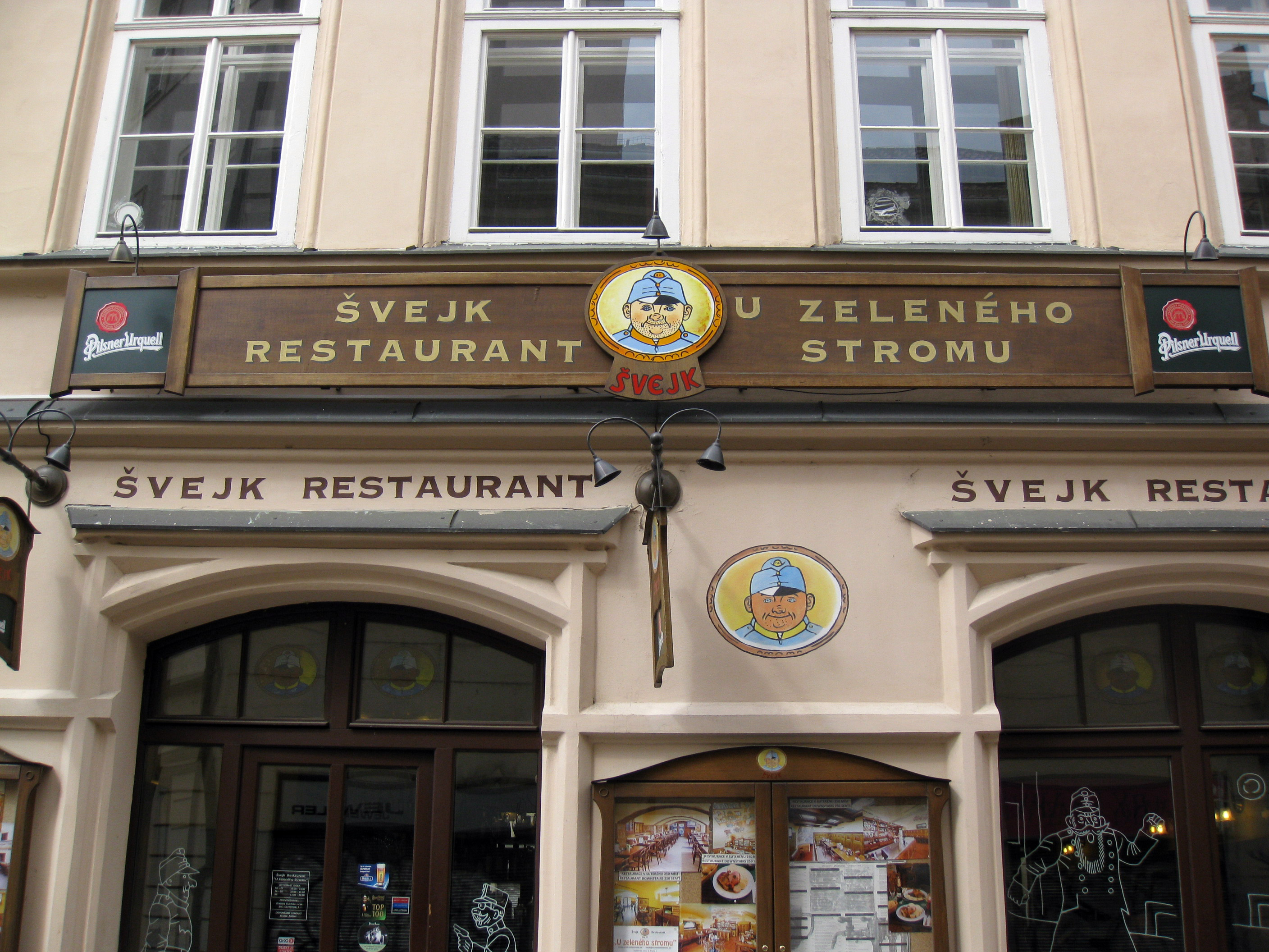 Měšťanský dům U zeleného hroznu (Staré Město), Praha 1, Betlémské nám., Husova 351/6, Staré Město